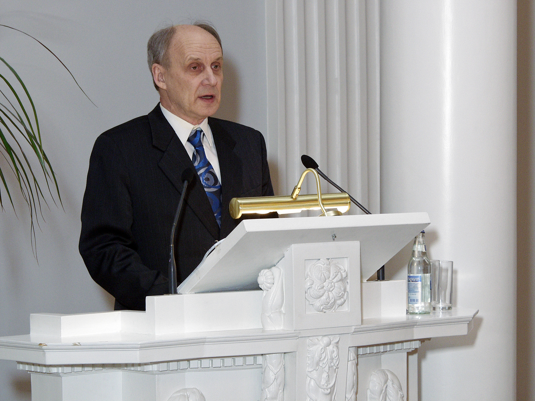 1.–4. veebruarini 2005 tähistati Tartu Ülikoolis keeleteadlase Paul Ariste 100. sünniaastapäeva. 3. veebruaril toimus Tartu Ülikooli aulas mälestuskonverents. Esineb TÜ läänemeresoome keelte emeriitprofessor Tiit-Rein Viitso ettekandega teemal „Innovaatiline Ariste“.